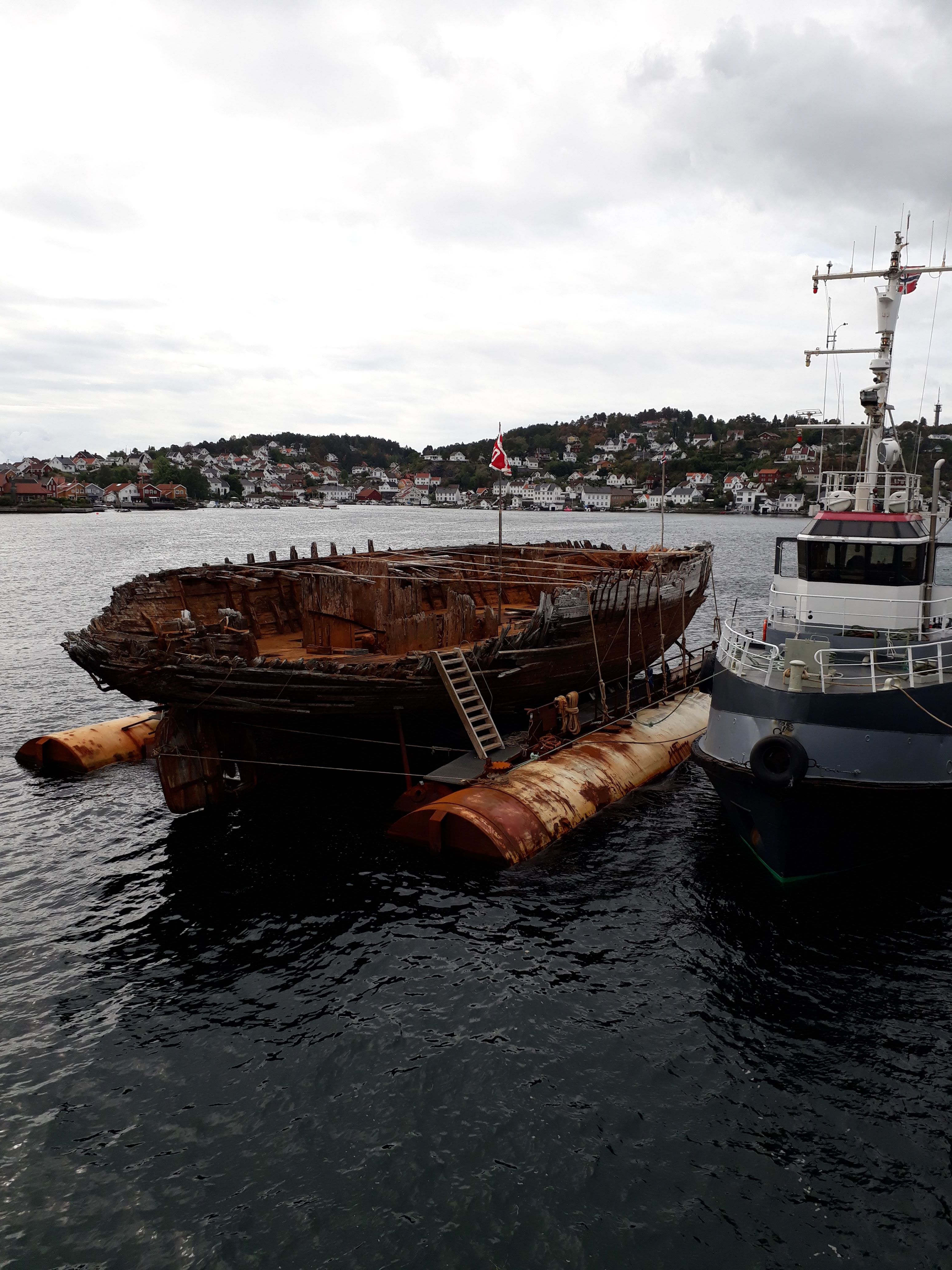 Maud og Tandberg Polar til kai i Arendal. 15.08.2018